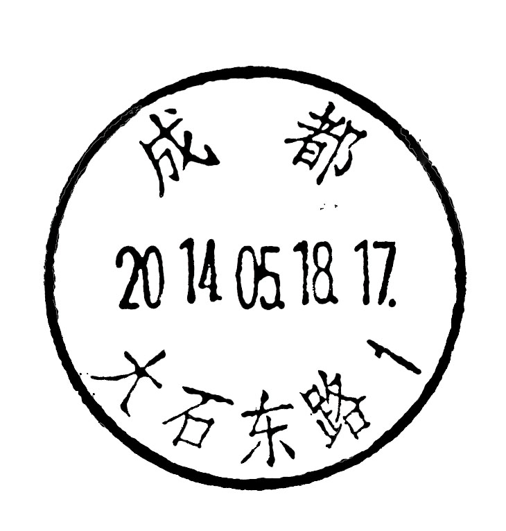 中文（中国大陆）: 2014年5月18日成都大石东路邮戳